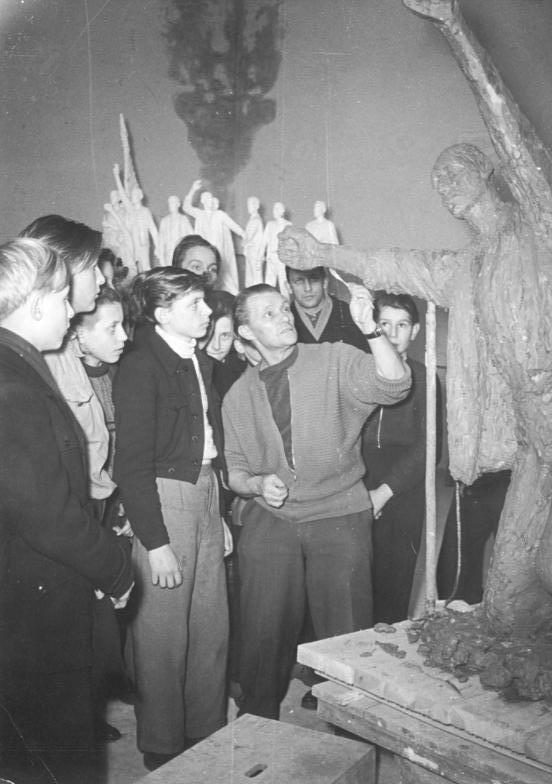 Berlin, Jugendstunde, Fritz Cremer Zentralbild Sturm Junge 30.3.1955 1390. A.-V. 31.3.1955 Vorbereitung zur Jugendweihe Jugendliche besuchen Prof. Cremer Jugendliche aus der 7. Grundschule in Berlin-Pankow (Schulabgänger), die am 17. April 1955 an der Jugendweihe teilnehmen, besuchten am 23.3 den Bildhauer Nationalpreisträger Prof. Cremer in seinem Atelier. Prof. Cremer erklärte den Jugendlichen, wie eine Plastik entsteht und welches Material verwendet wird. U. B. z. Prof. Cremer mit Jugendlichen vor einer Figur, die zu einer Gruppe für die Buchenwaldgedenkstätte gehört.